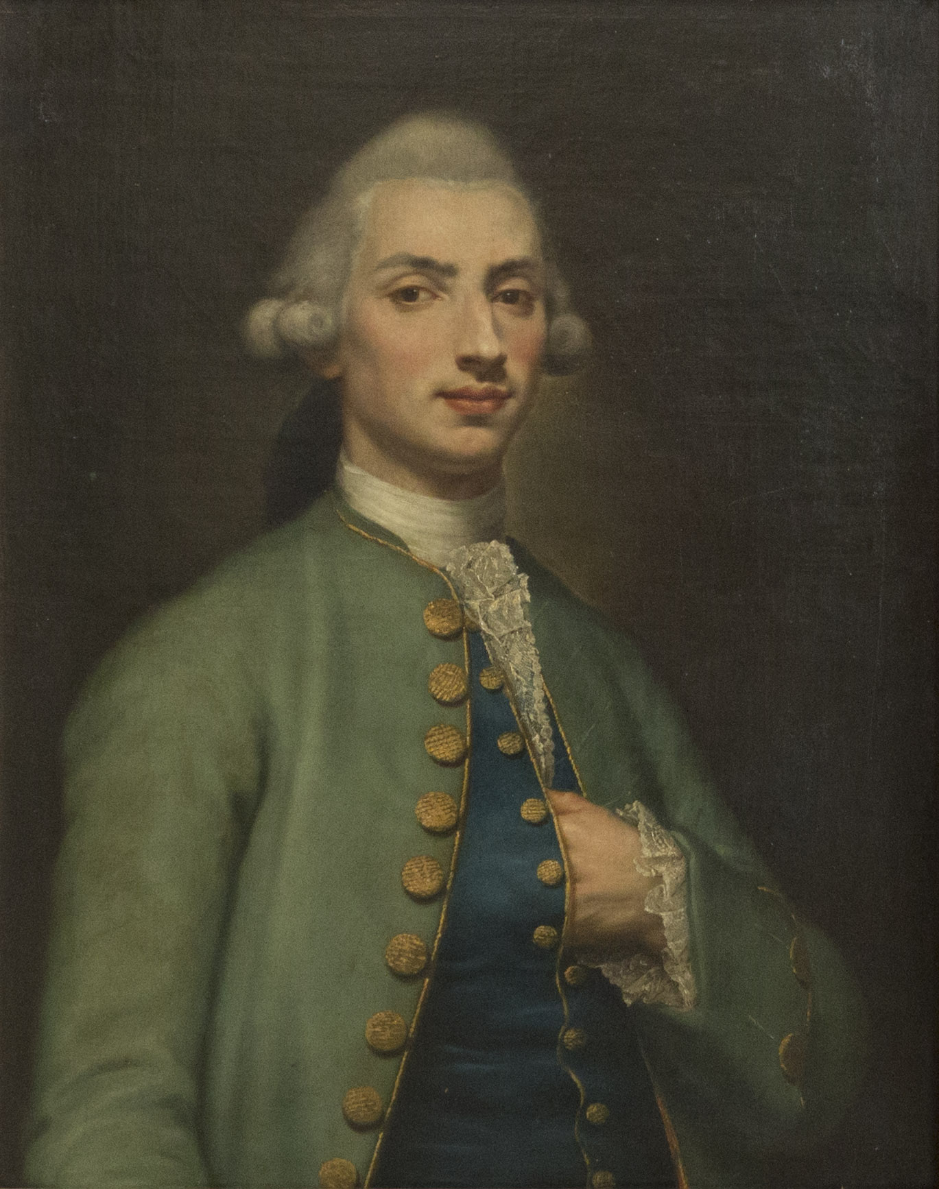 Retrato del platero Antonio Martínez Barrio, óleo sobre lienzo, 88 x 69 cm, Madrid, Museo del Real Academia de Bellas Artes de San Fernando